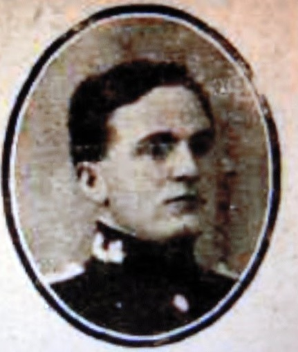 Fotografía del teniente veterinario español don Eduardo Caballero Morales con uniforme de gala